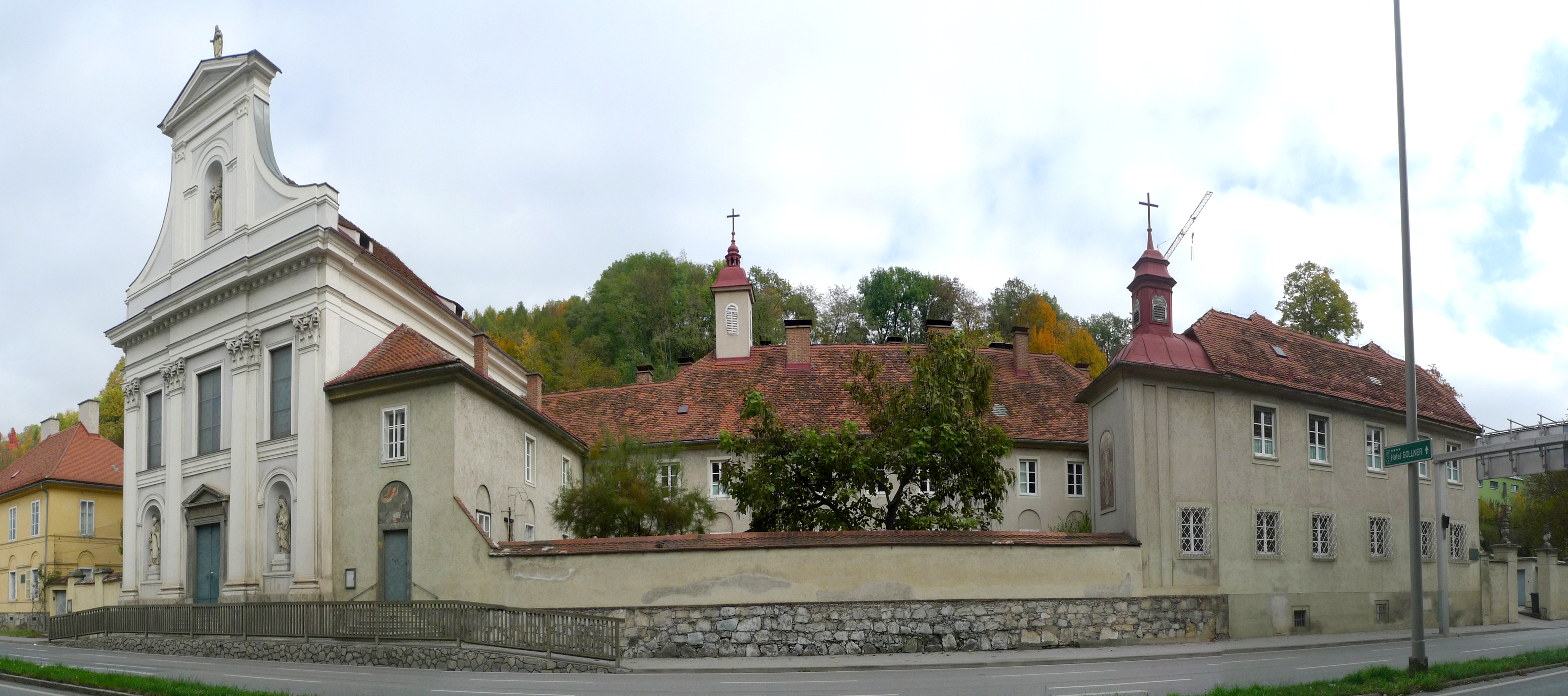 Karmelitinnenkloster mit Einfahrtstor, Ummauerung und Gruftkapelle